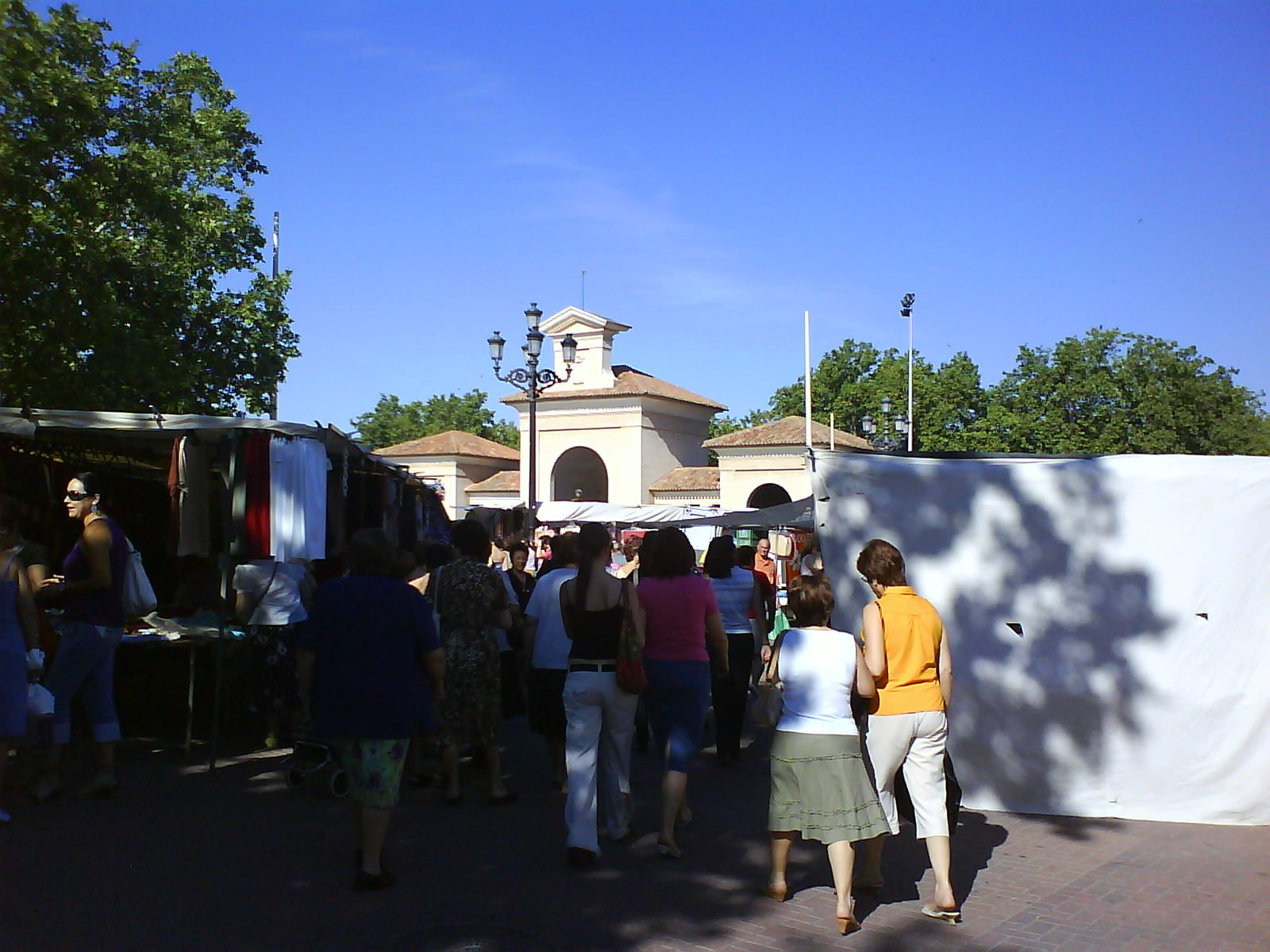 Imagen de una de las entradas al mercadillo de "Los invasores" que tiene lugar en las inmediaciones del recinto ferial de Albacete durante los martes.